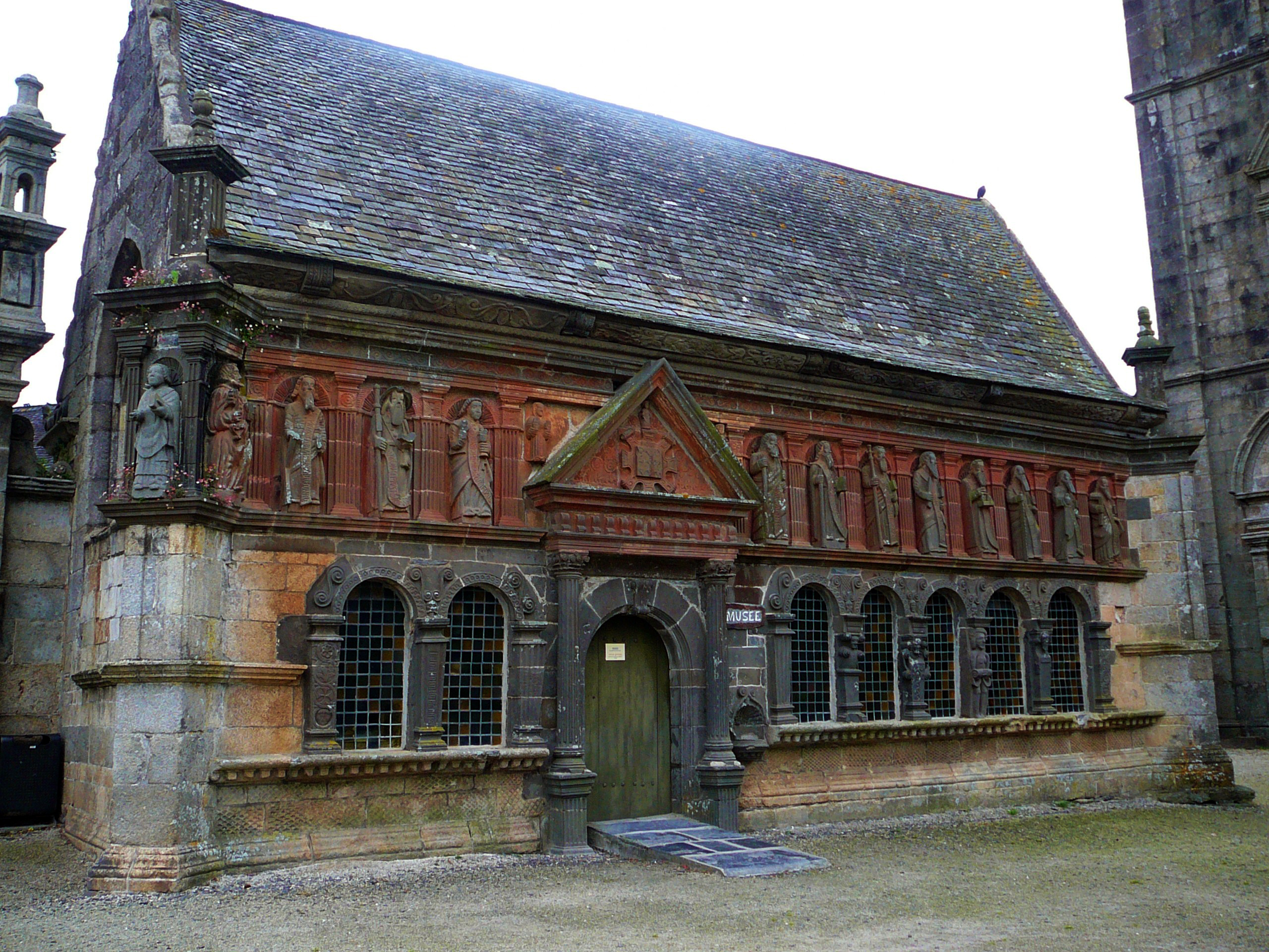 L'ossuaire de Sizun